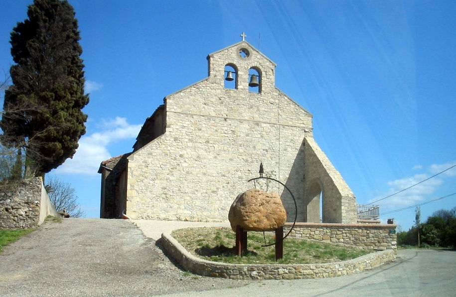 Eglise de Saint-Gaudéric.